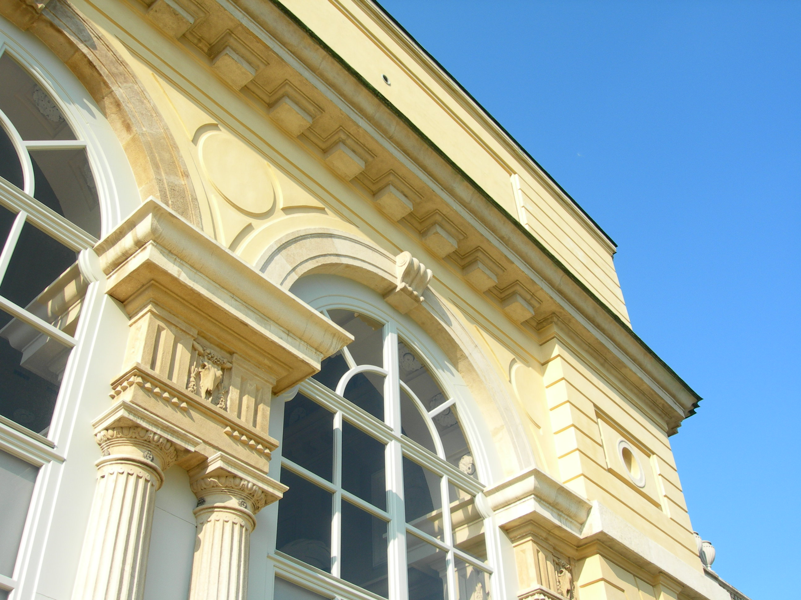 Detail of Gloriette, Schloss Schönbrunn, Vienna